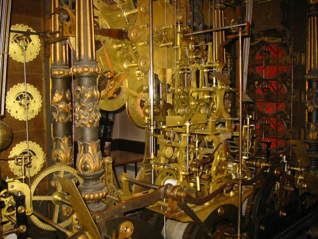 Mécanisme 1 de l'horloge astronomique de la cathédrale St Jean de Besancon